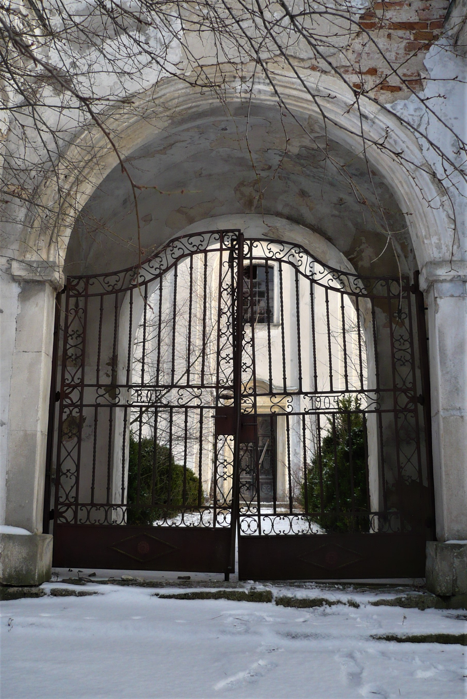 Biały Kamień. Kościół